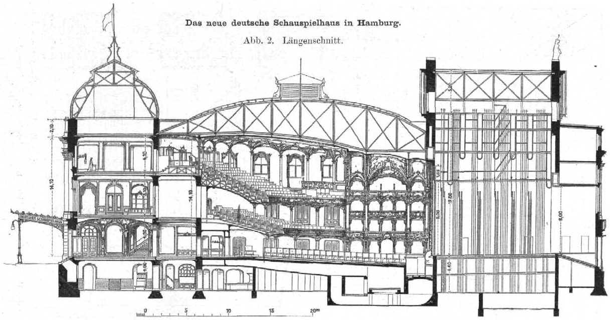 Deutsches Schauspielhaus, Neubau 1901, Längsschnitt durch das Theater